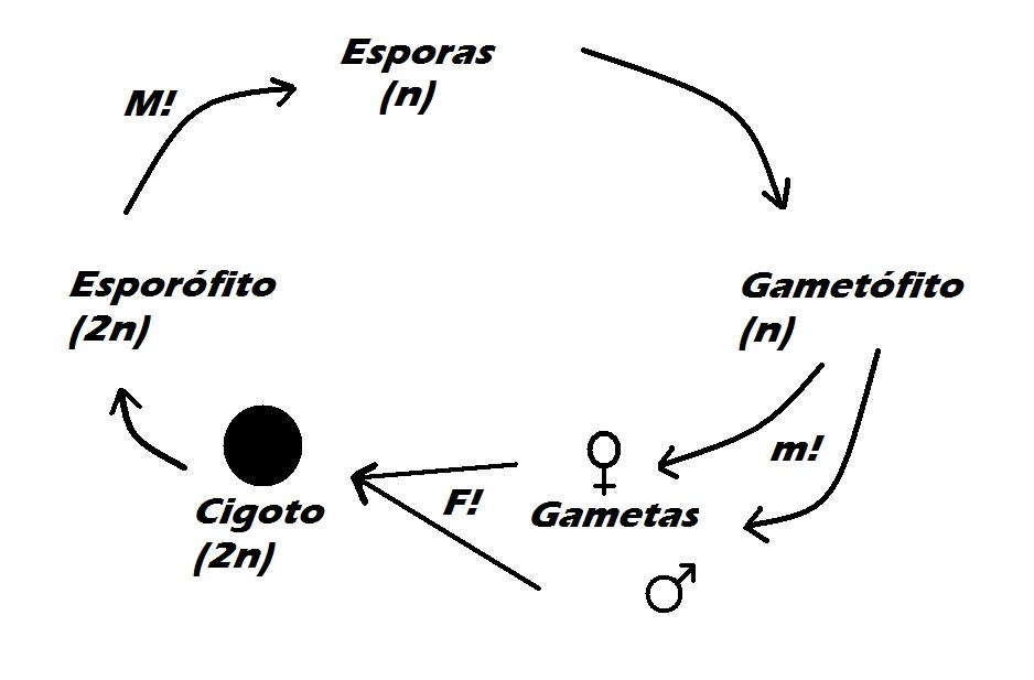 Gráfico del ciclo de vida Haplo-Diplonte en helechos